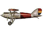 Modell Nieuport 52